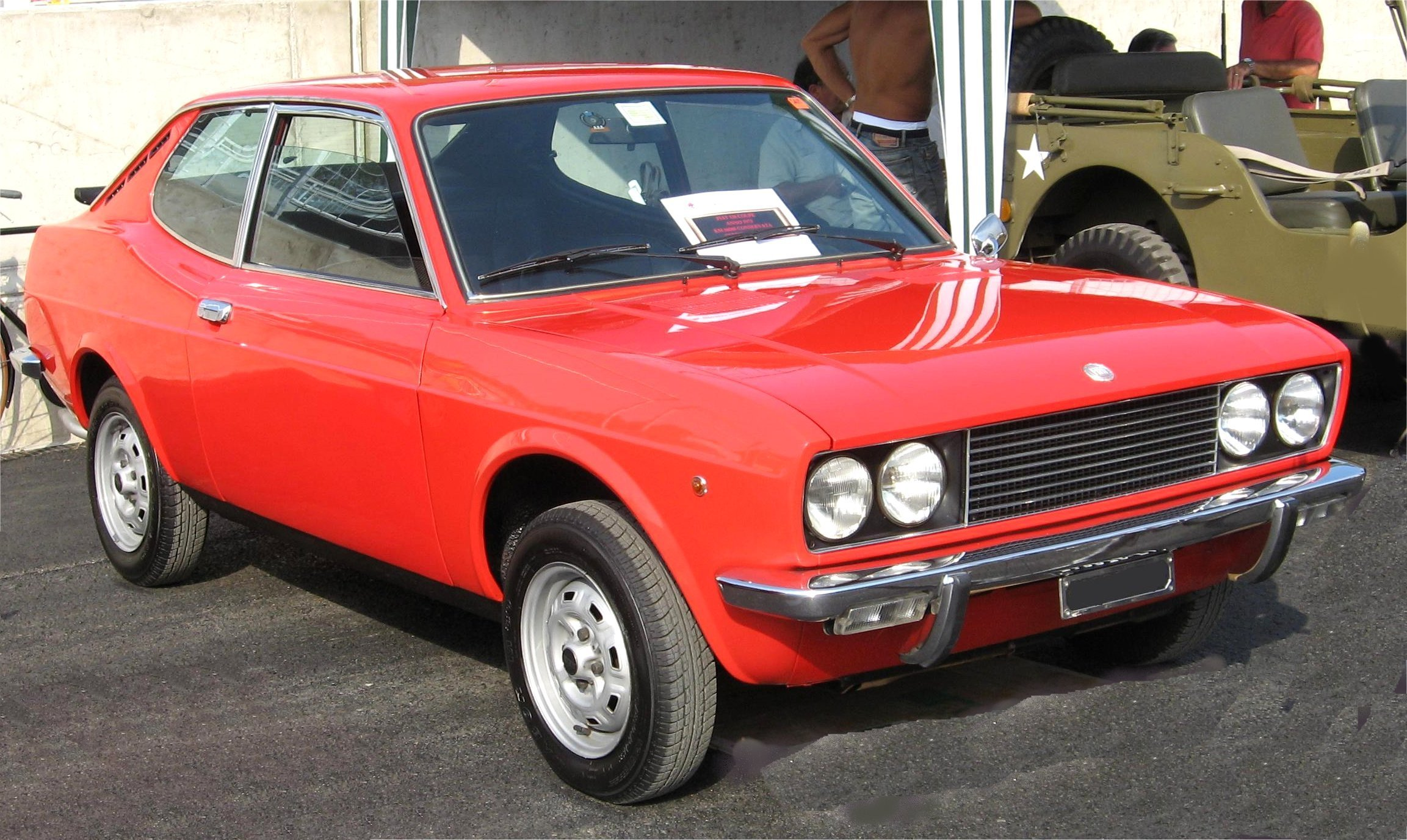 Fiat 128 Coupé SL 1100 del 1972